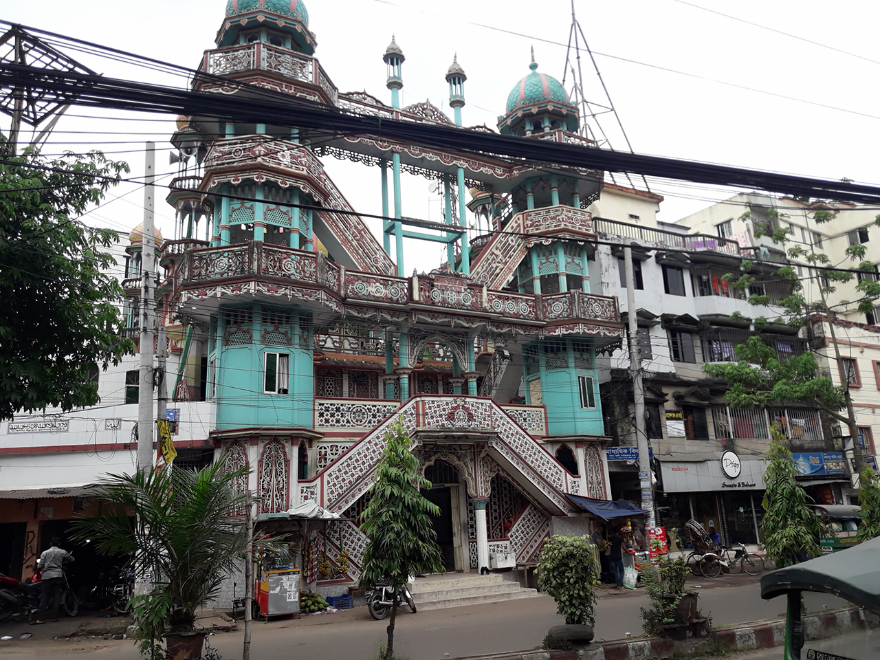 মসজিদ-ই-সিরাজ উদ-দৌলা